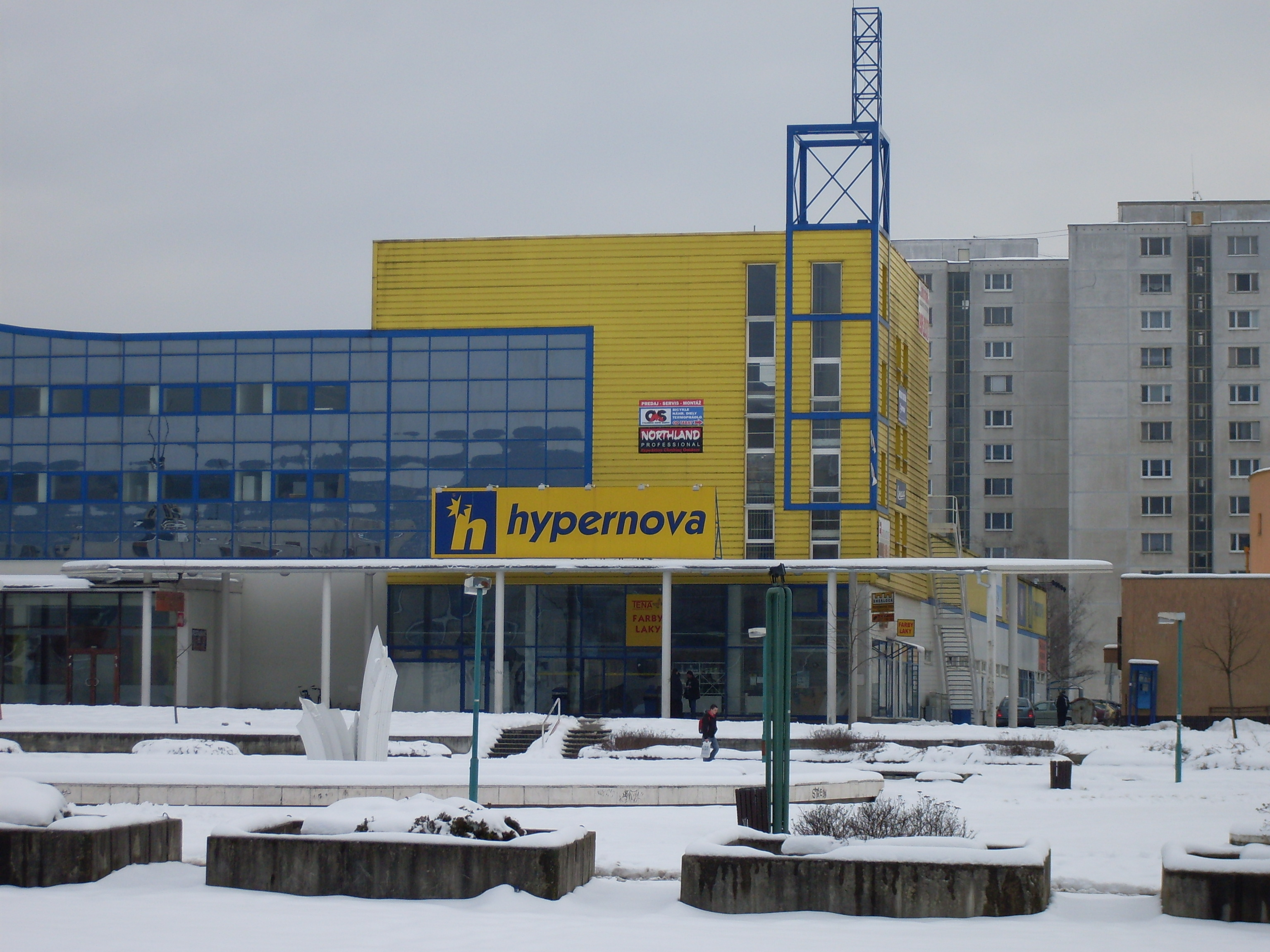 Fotky z mesta Považská Bystrica Hypernova